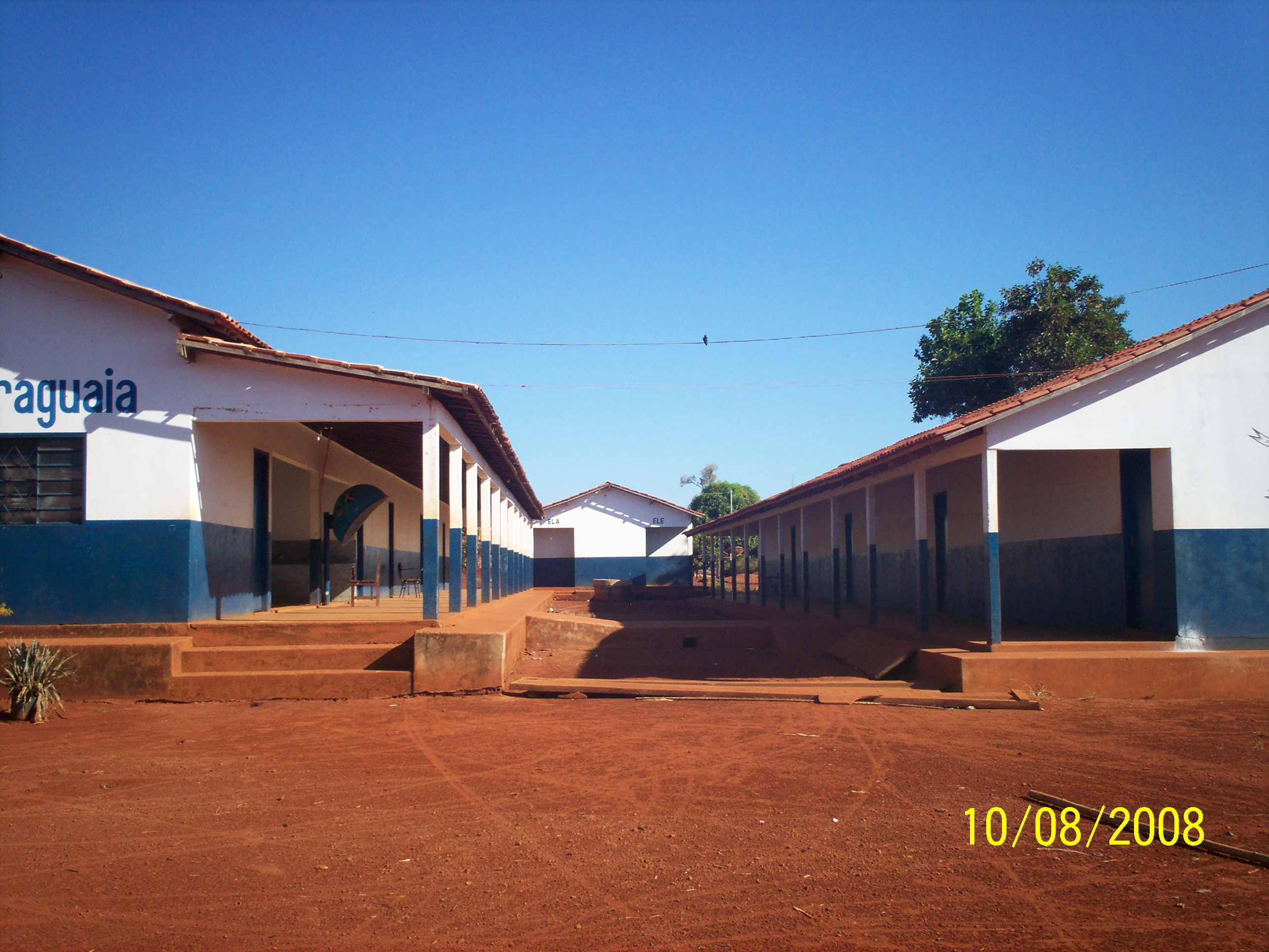 Esta imagem é da Esc. Mul. Sorriso do Araguaia, localizada na Vila Bela Vista do Araguaia, no município de Floresta do Araguaia no estyado do Pará.